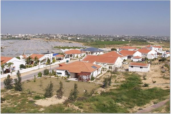 כפר ים התמונות באדיבות קטיף.נט (קישור) אתר האינטרנט של גוש קטיף. צילם: מוטי סנדר.